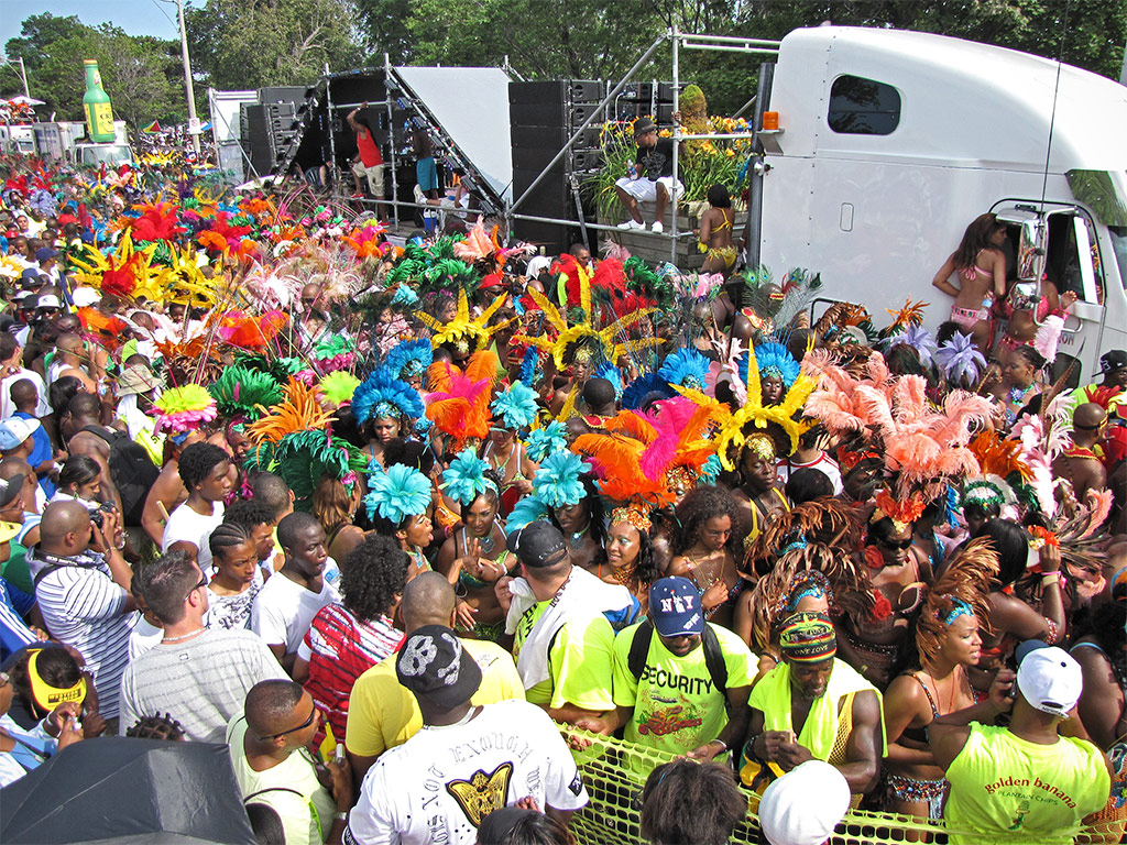 caribana parade 2009